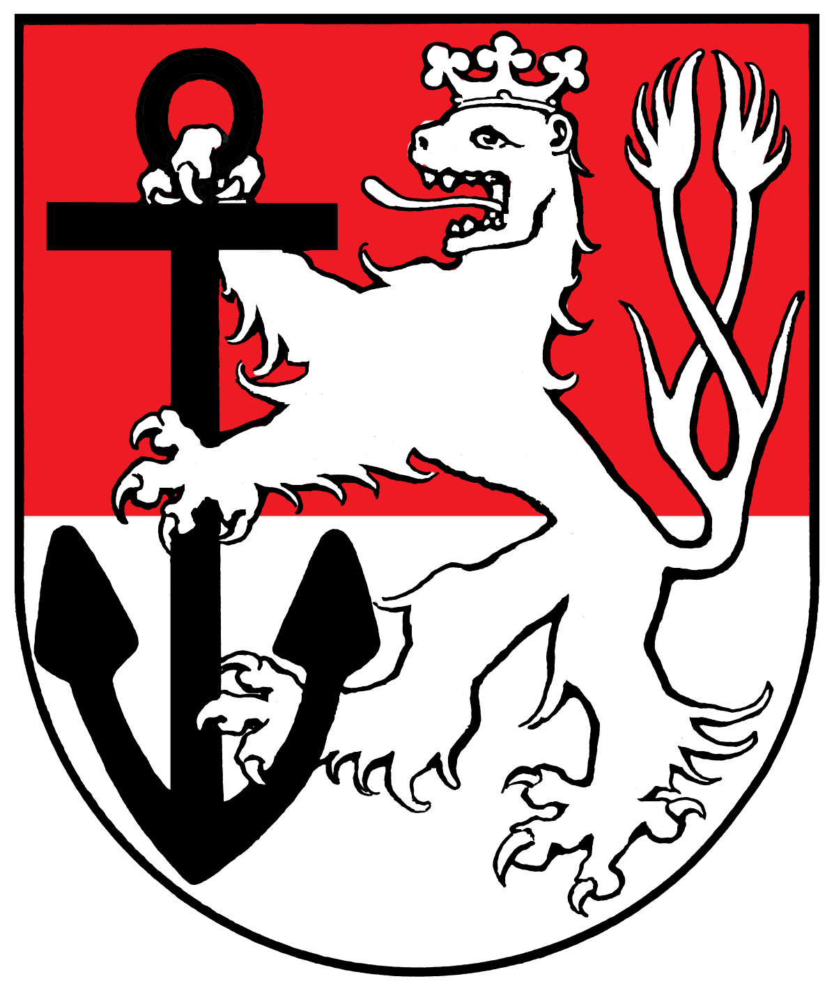 Wappenzeichen der Stadt Düsseldorf - Ein Wappen „für Jedermann“, Genehmigung vorhanden (siehe Mailantwort unten)